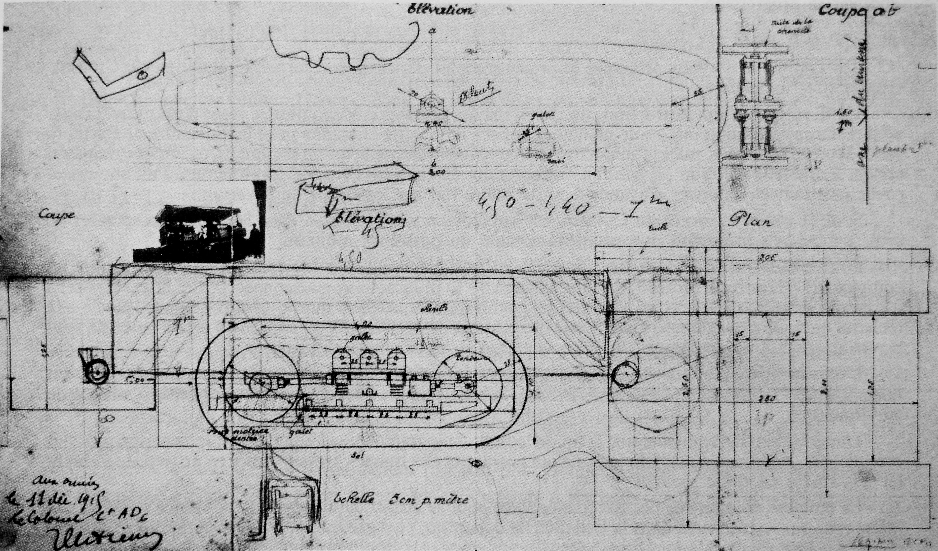 Estienne_tank_drawings_11_December_1915